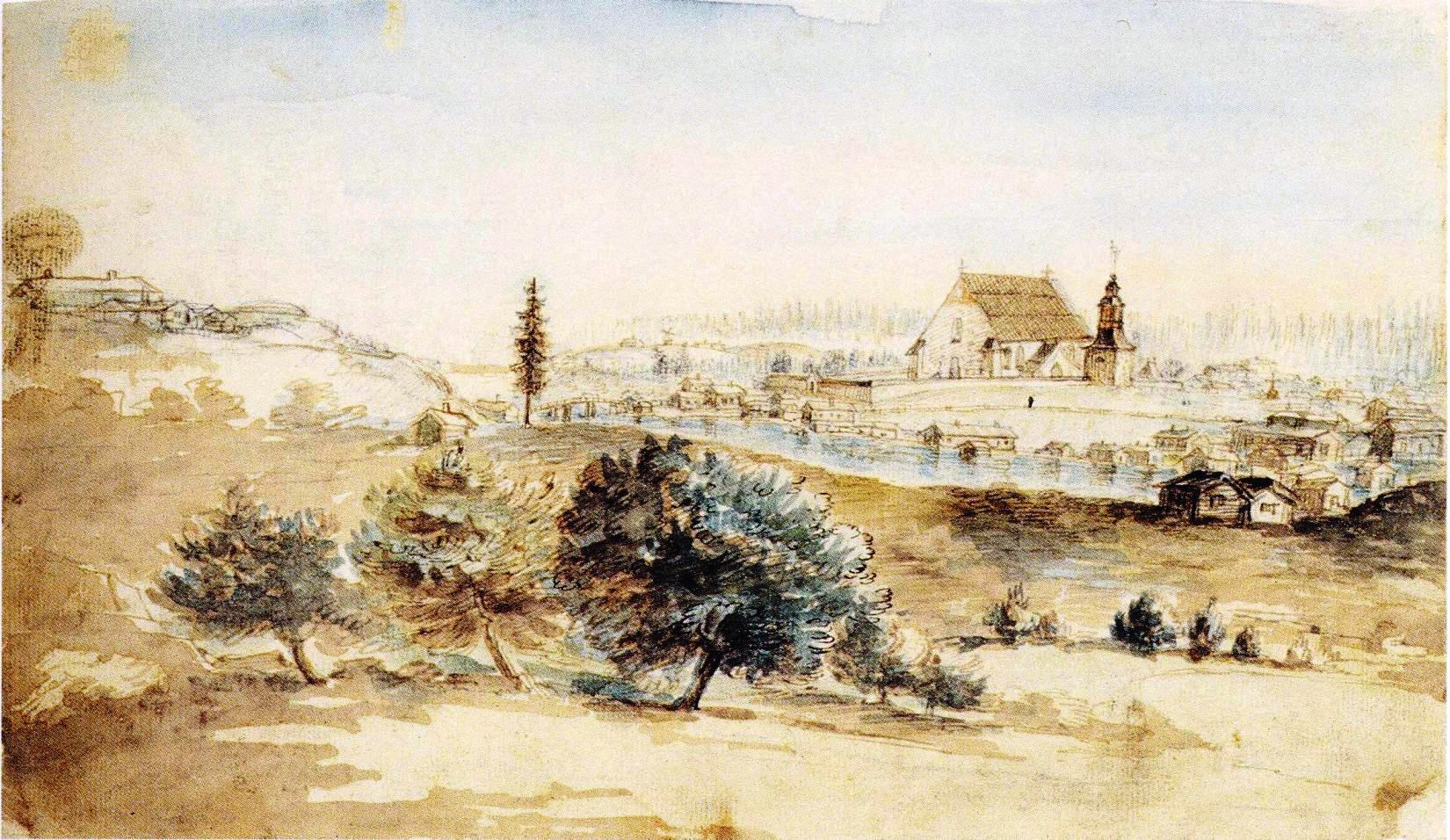 G. W. Finnberin vesivärimaalaus Paraisten kirkon seudusta. Finnbergin isä oli sillanvartija ja hänen lapsuudenkotinsa on yksi sillan päässä olevista mökeistä.